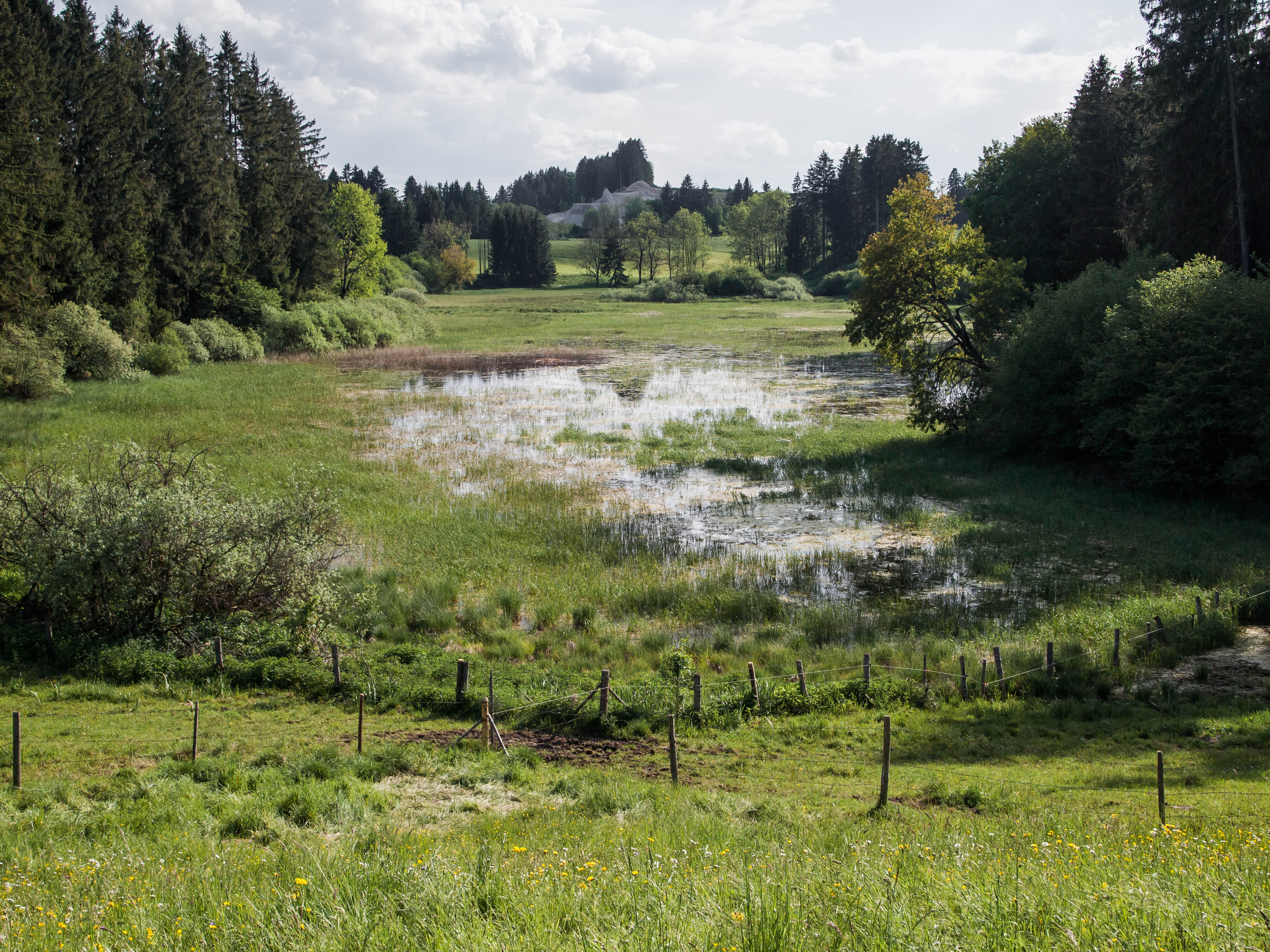 Blick von Nordosten auf den Toteiskessel bei Haslach zwischen Bernbeuren und Burggen, Oberbayern. (LSG:BY-LSG-00016.01)_LSG Toteiskessel zwischen Burggen und Bernbeuren, Geotop-Nummer: 190R003 Toteislöcher bei Borzenwinkel.